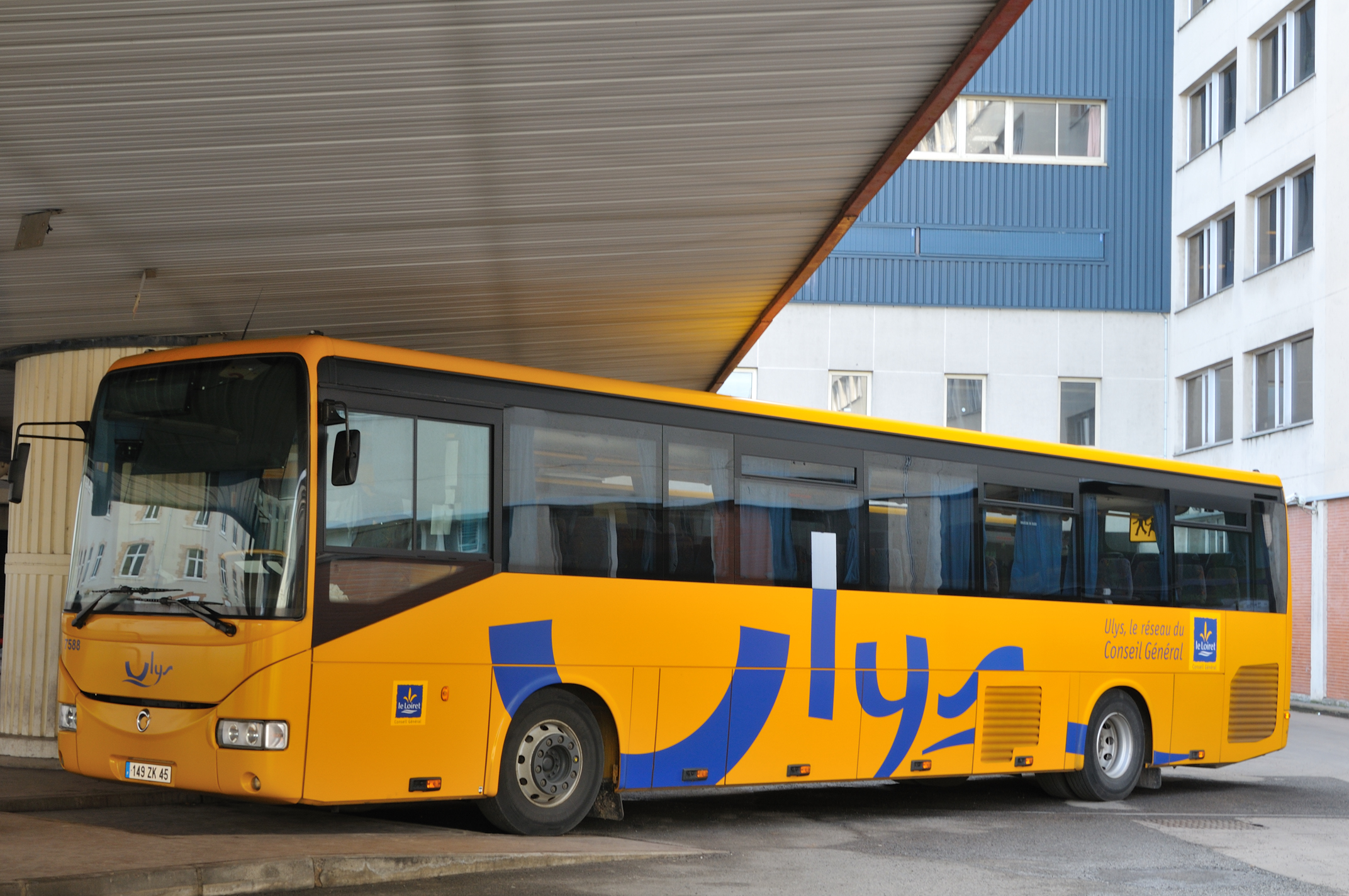 Gare routière d'Orléans, Loiret, France Un autocar du réseau Ulys de transports en commun du Loiret